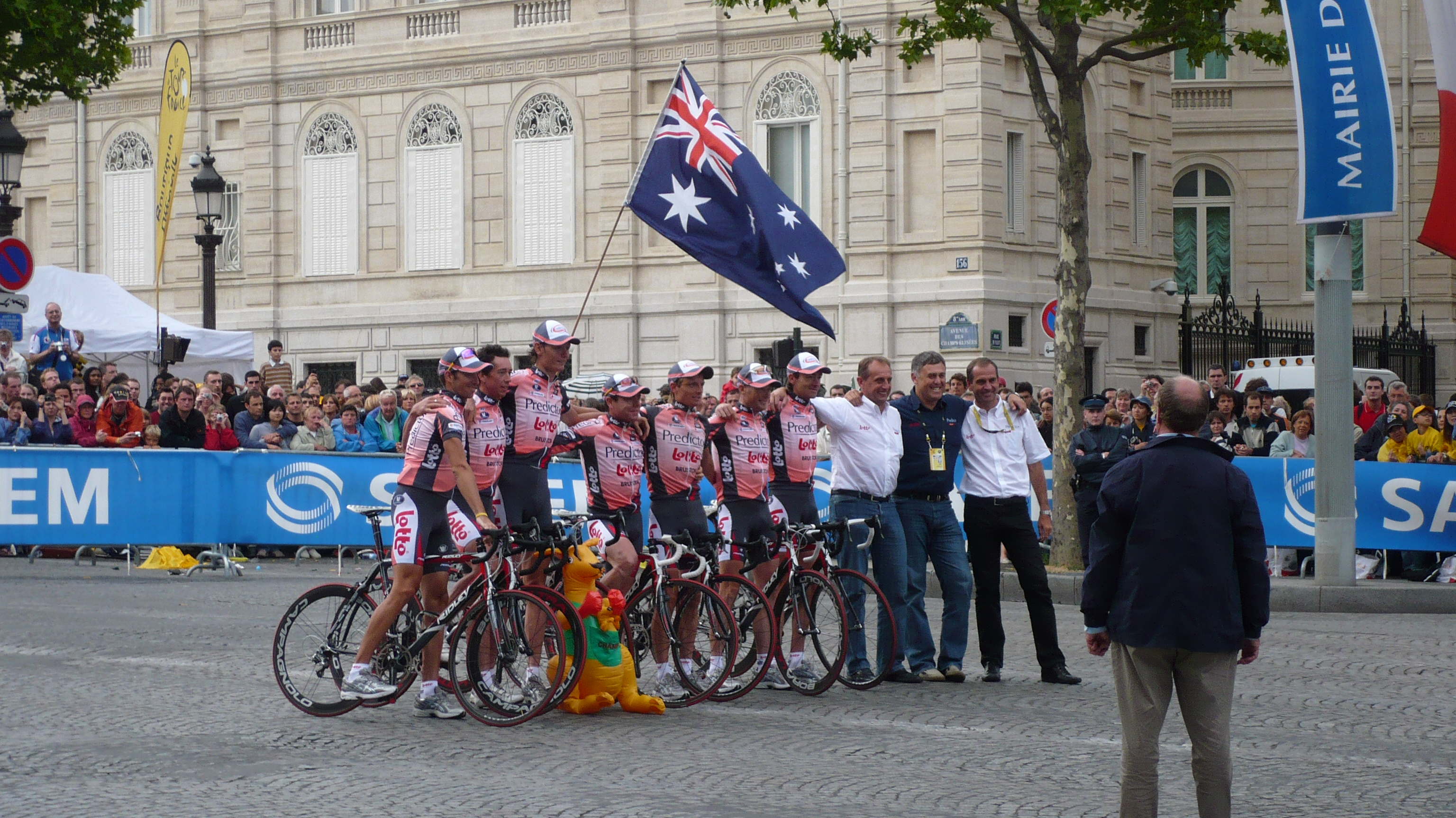 Arrivé de l'equipe lotto sur les champs-élysées